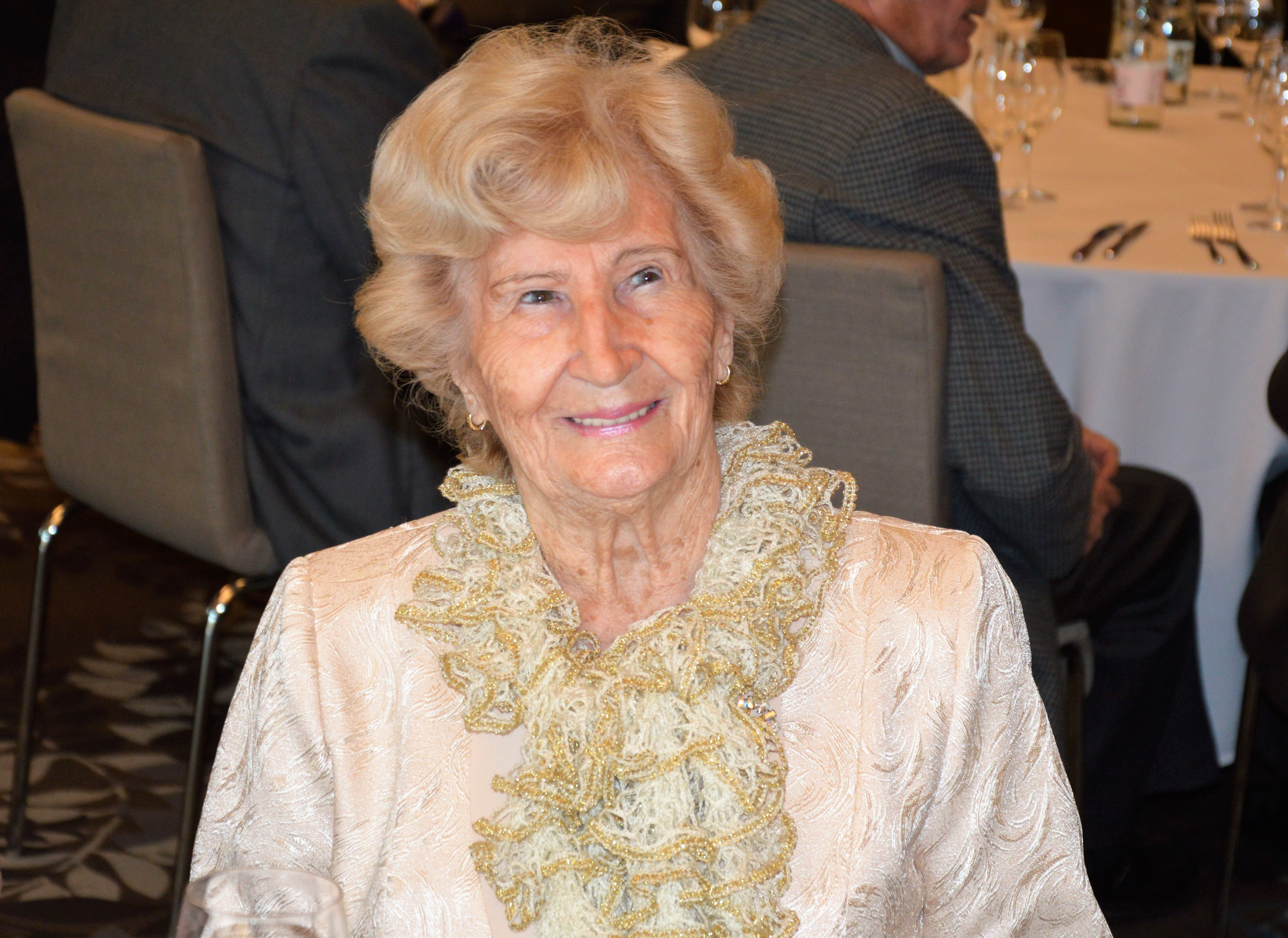 Köteles Erzsébet olimpiai bajnok tornásznő